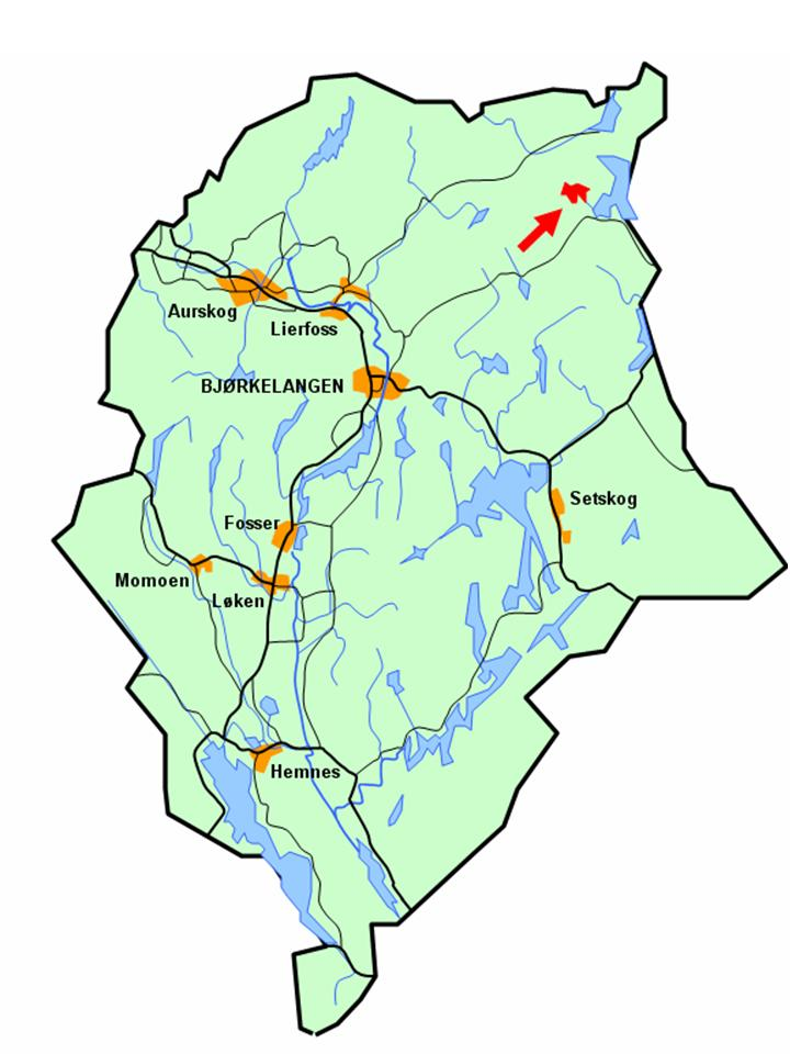 Stilisert kart som viser Sootsjøen sin lokalisering i Aurskog-Høland kommune.